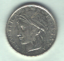 Italia - 100 lire - 1993 Italia Turrita circondata dall'iscrizione "REPVBBLICA ITALIANA". In basso due stelle e sotto l'indicazione dell'autore Laura Cretara